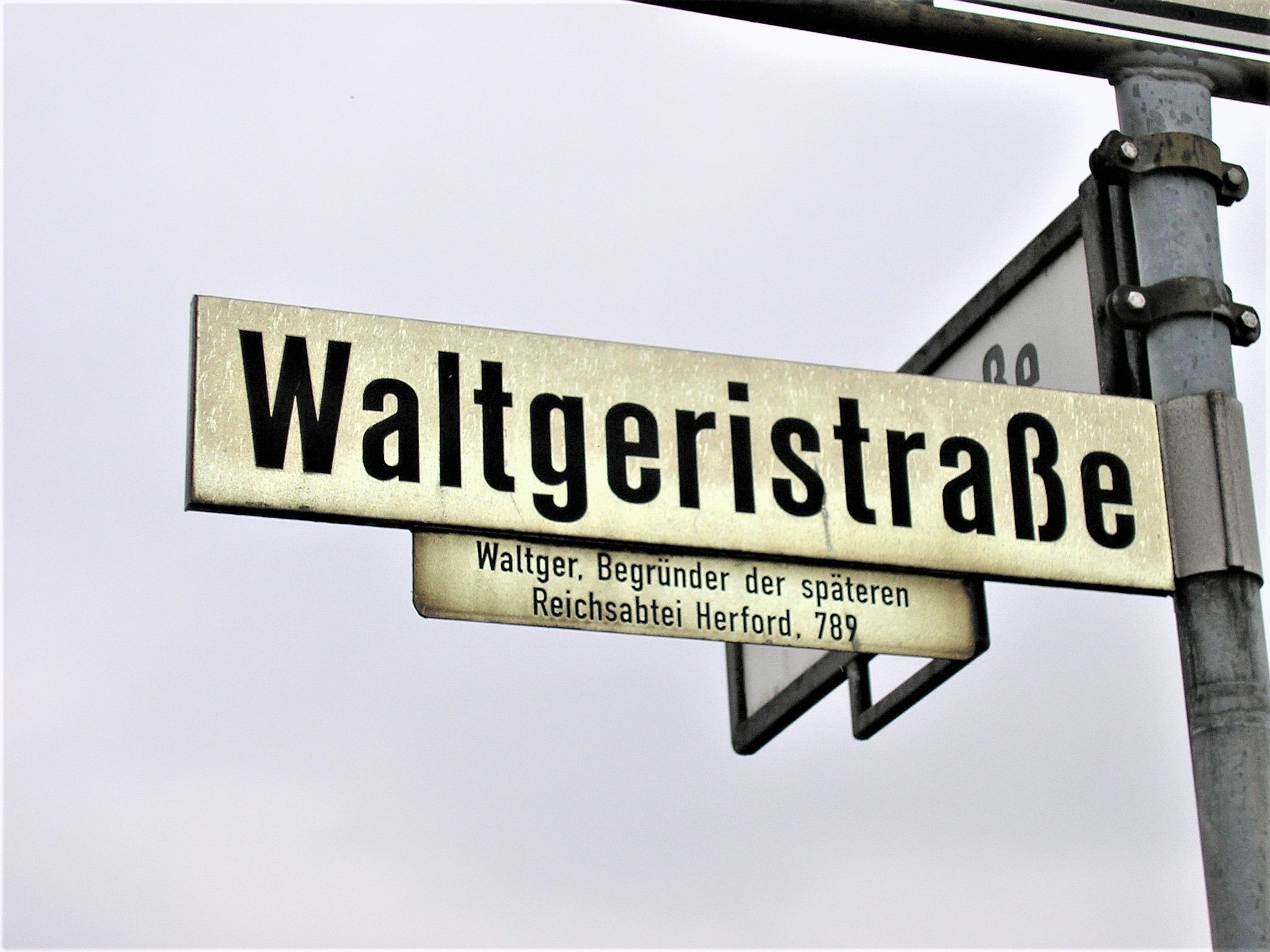 Schild Waltgeristraße mit Hinweis zum Heiligen Waltger.